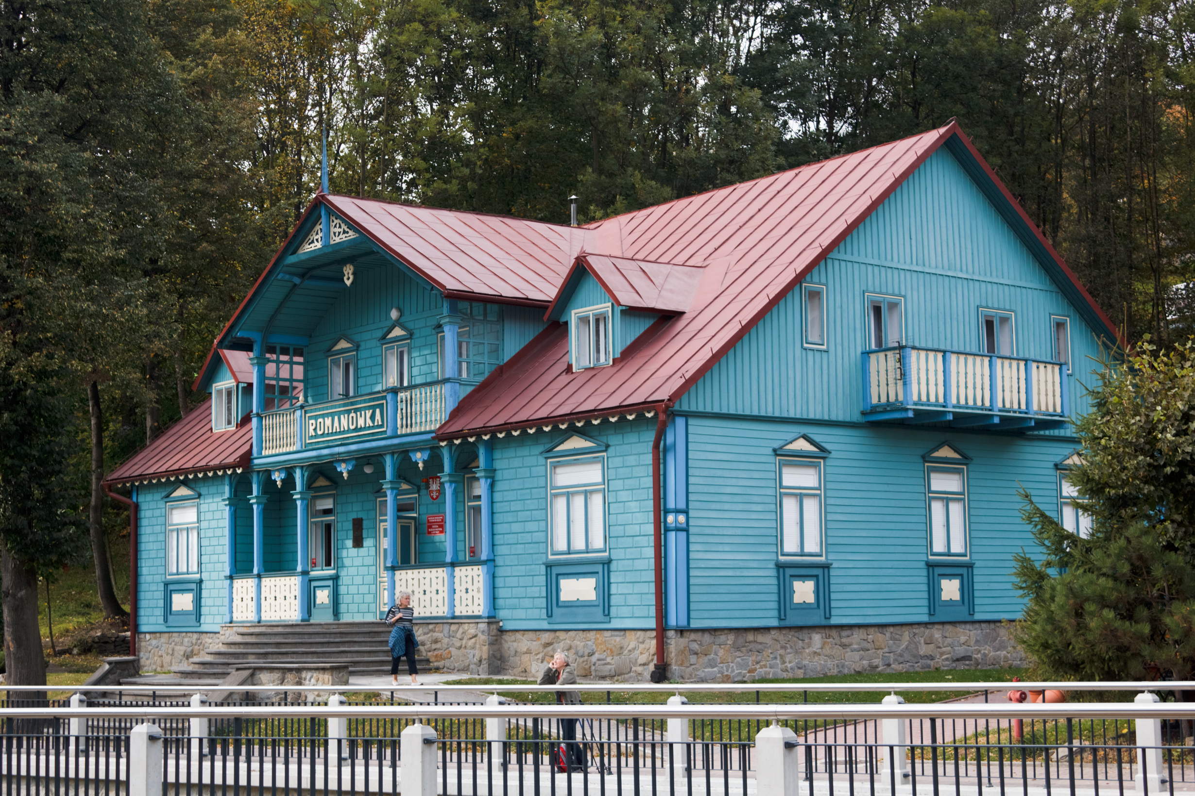 Willa „Romanówka” Krynica-Zdrój, Bulwary Dietla 19, Krynica-Zdrój